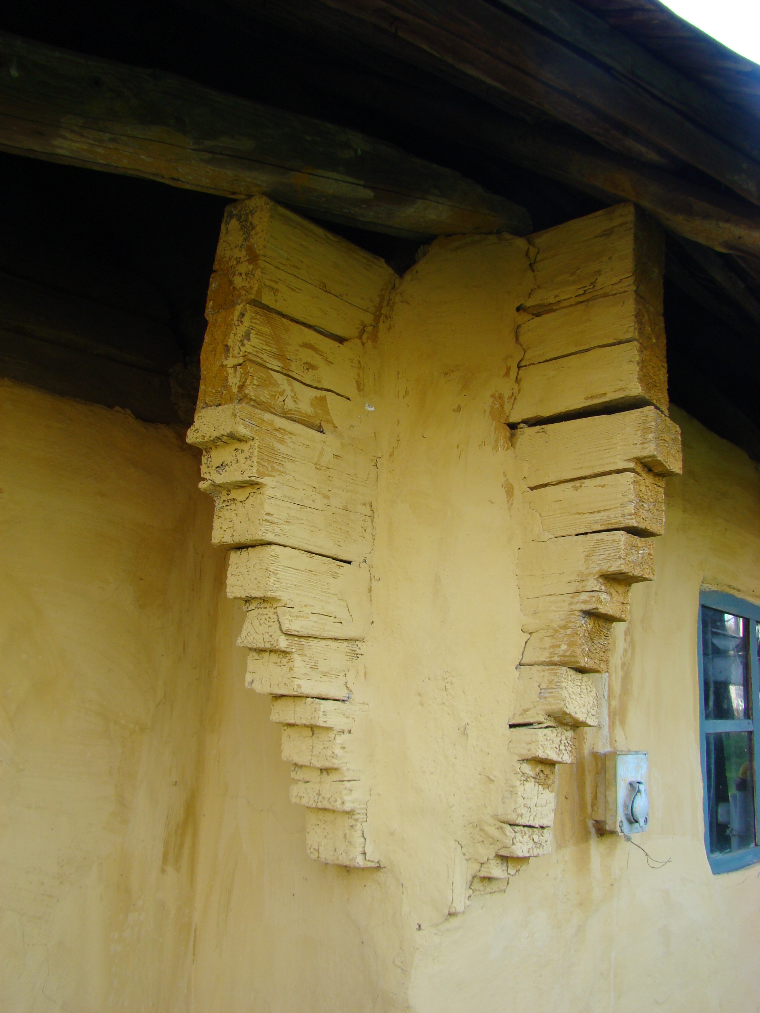 Biserica de lemn "Sf. Arhangheli Mihail şi Gavriil" , sat BERCHIEŞU; comuna FRATA